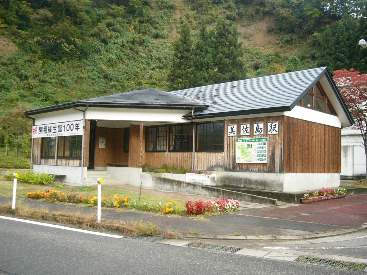 Misashima Station